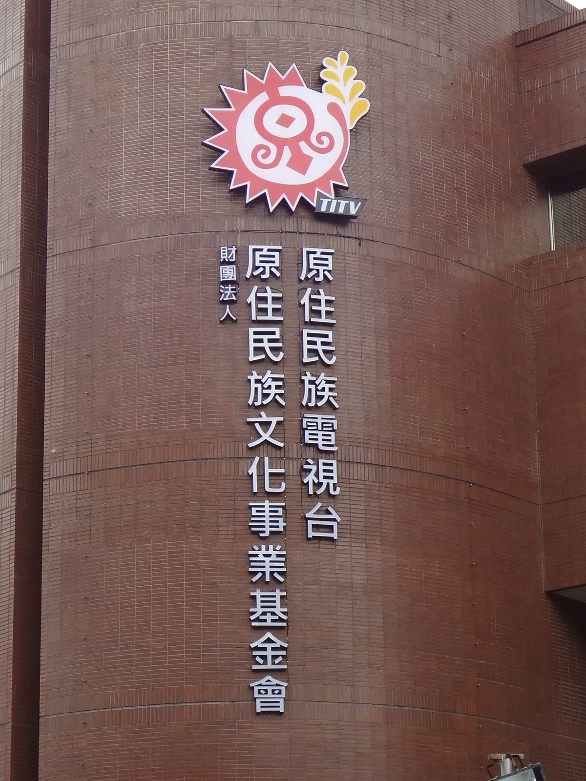 中國電視大廈外牆懸掛的原住民族文化事業基金會與原住民族電視台標誌。